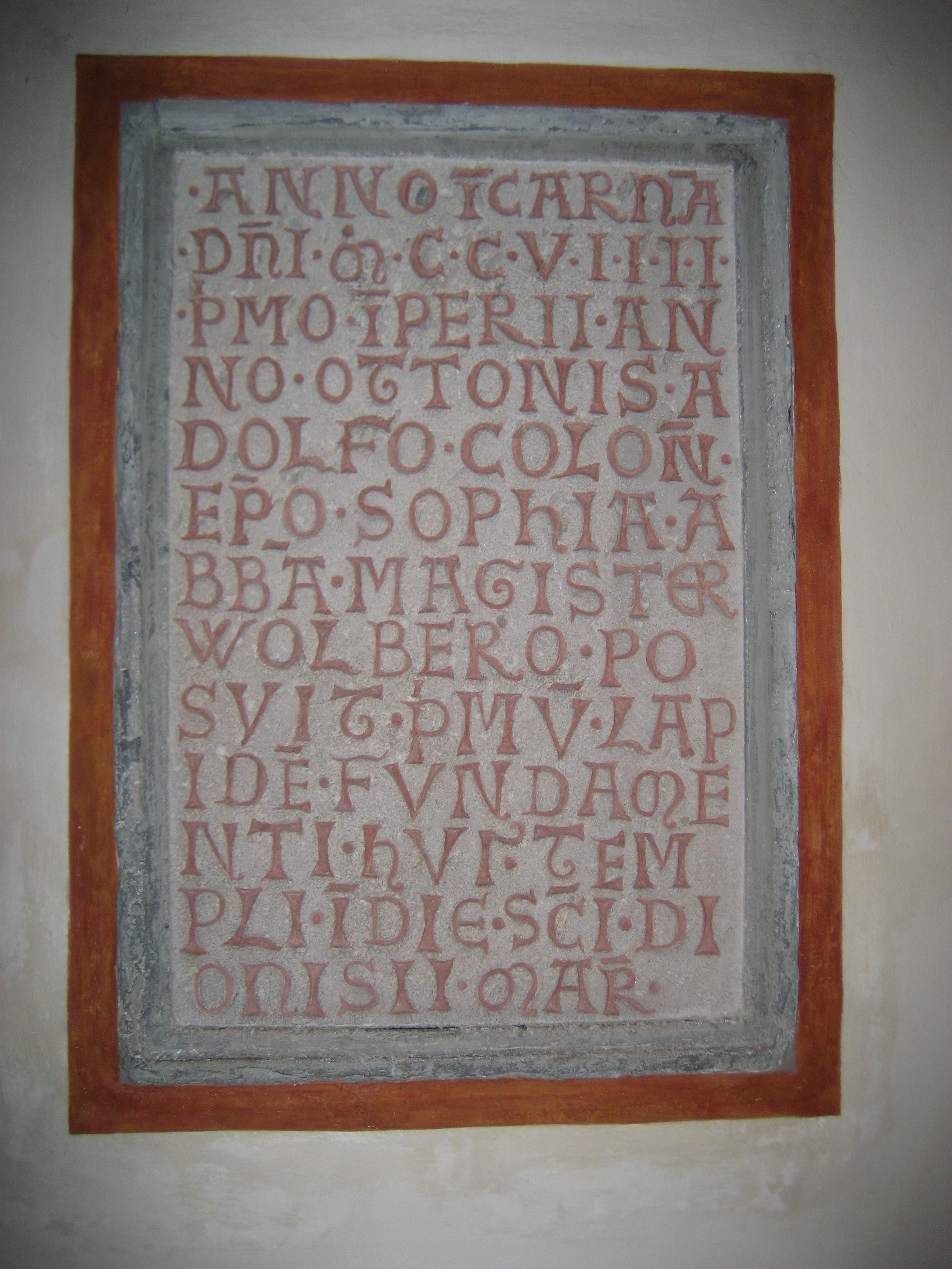 Bauinschrift des Wolbero im Quirinus-Münster in Neuss. Die Aufnahme wurde 2008 gemacht. Die Inschrift ist in der Wikipedia wiedergegeben.